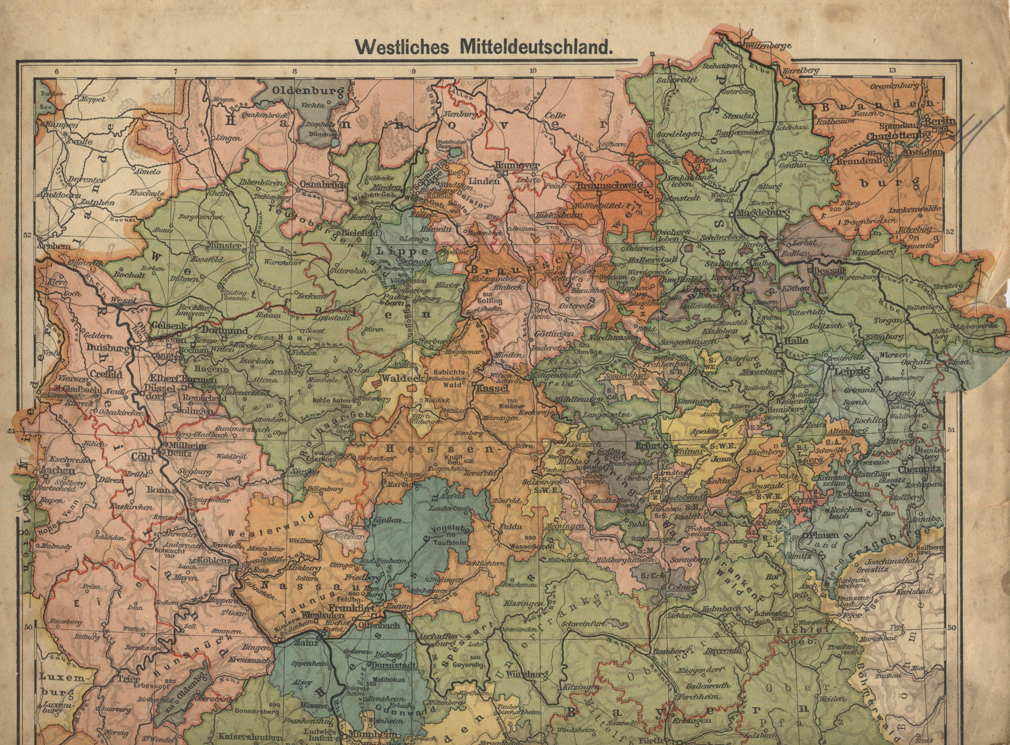 Westliches Mitteldeutschland